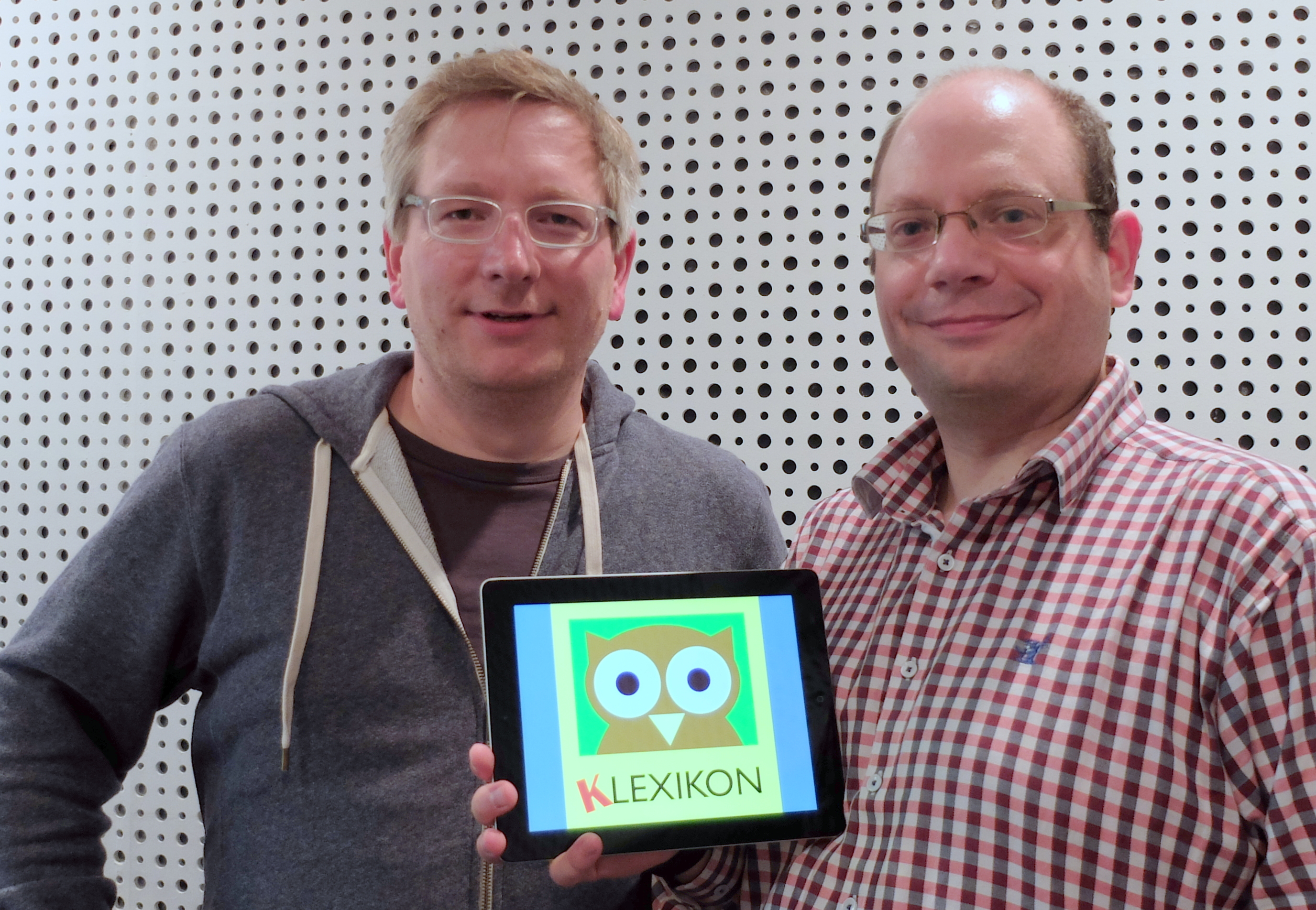 Ein Klexikon-Tag an der Technischen Universität Dortmund, mit Vortrag und Workshop. Siehe hier